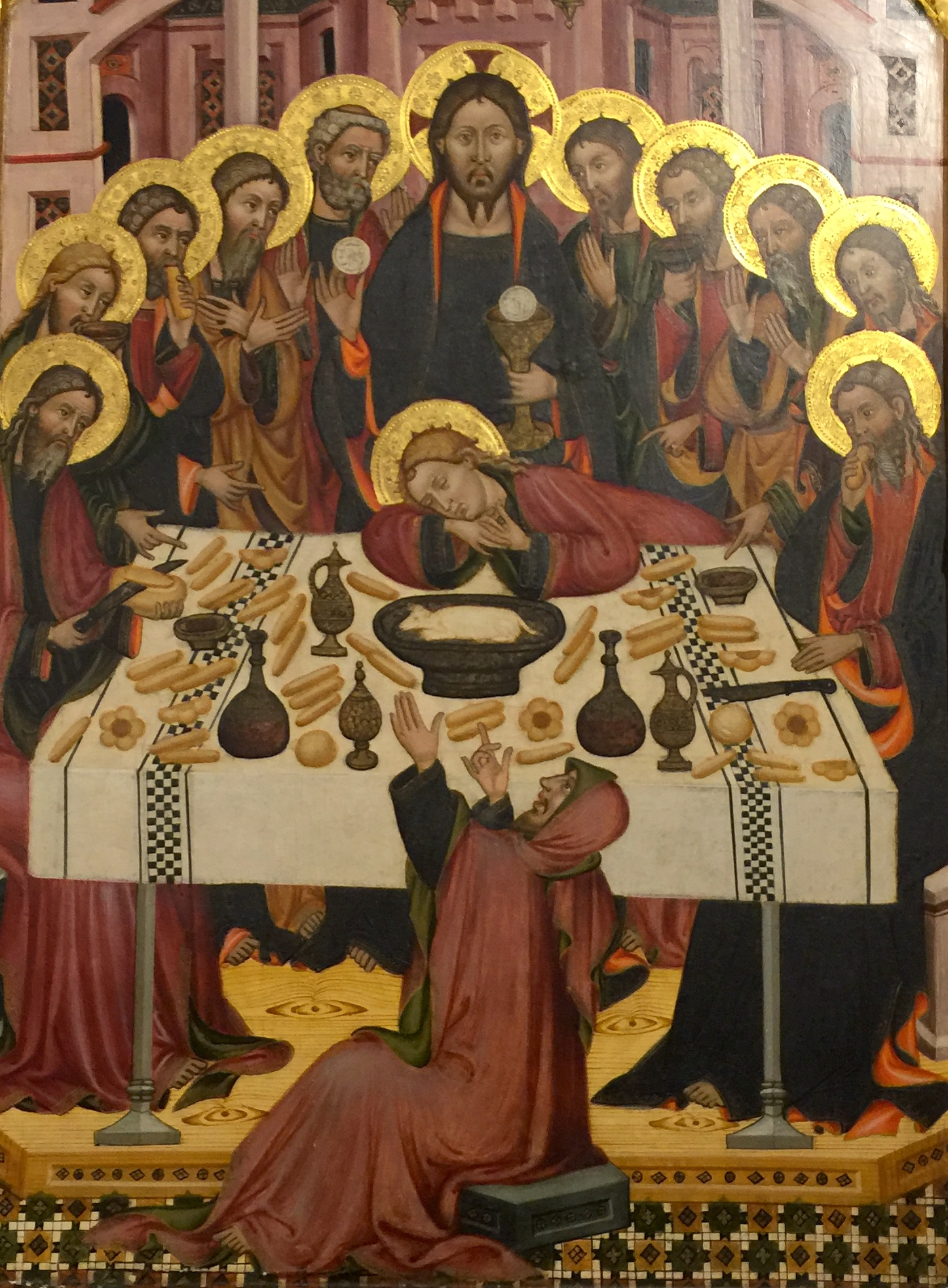 Panneau central. La Cène. Jean l'évangéliste est endormi sur la table.